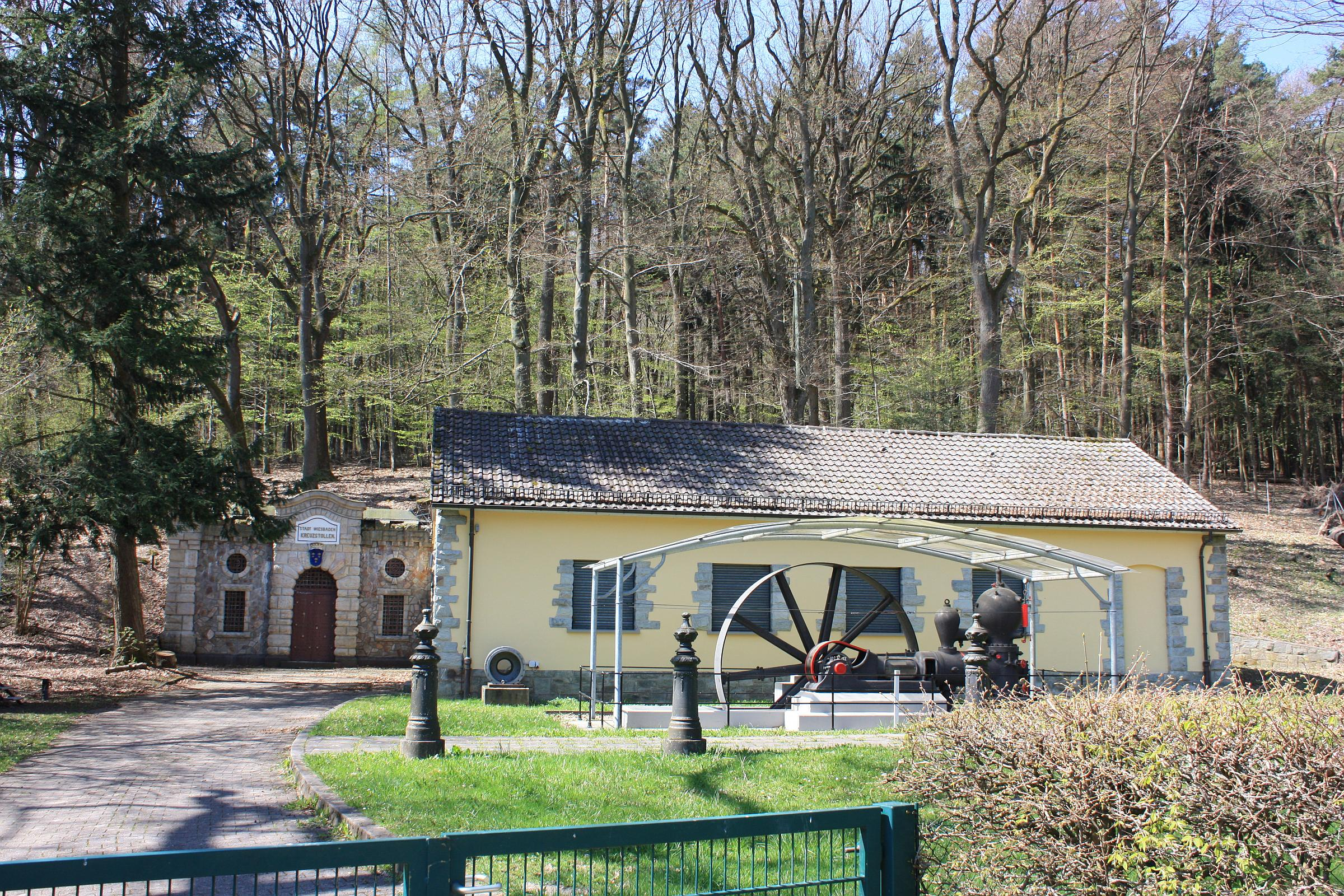 Der Zugang zum Kreuzstollen bei Wiesbaden, Hessen, Deutschland